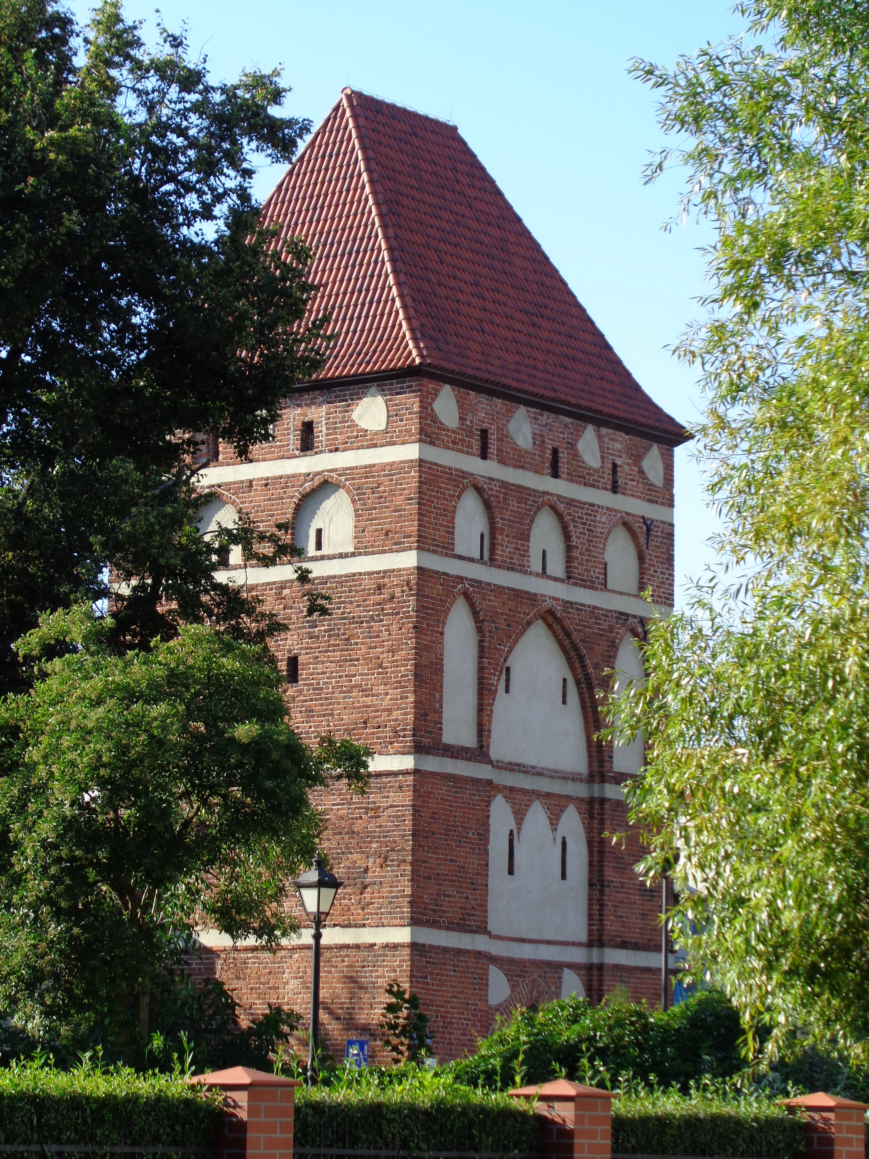 Malbork, Brama Garncarska (Św. Ducha, Elbląska), 2 poł. XIV